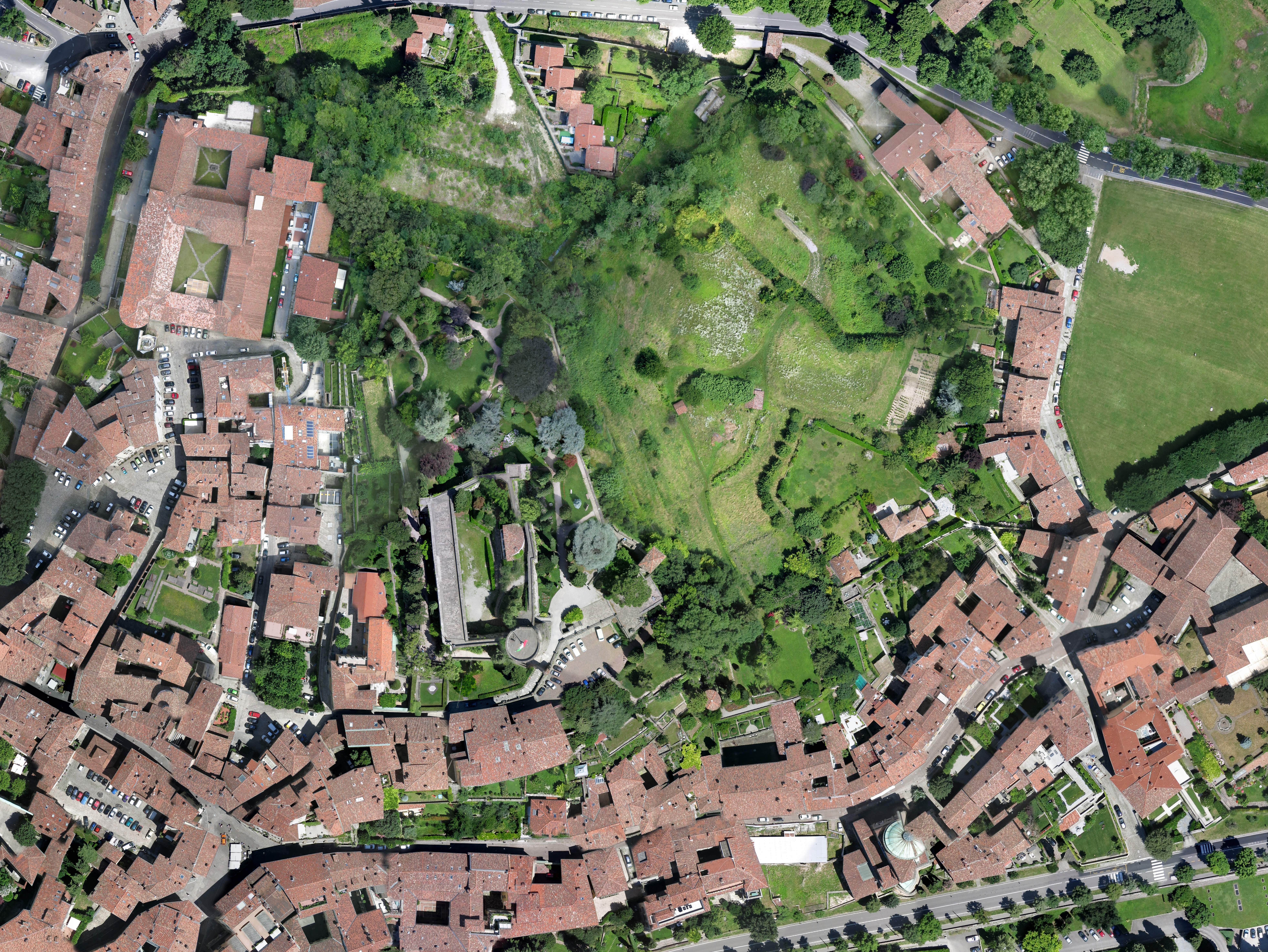 ortofotografia aerea fotogrammetrica.Horus Dynamics